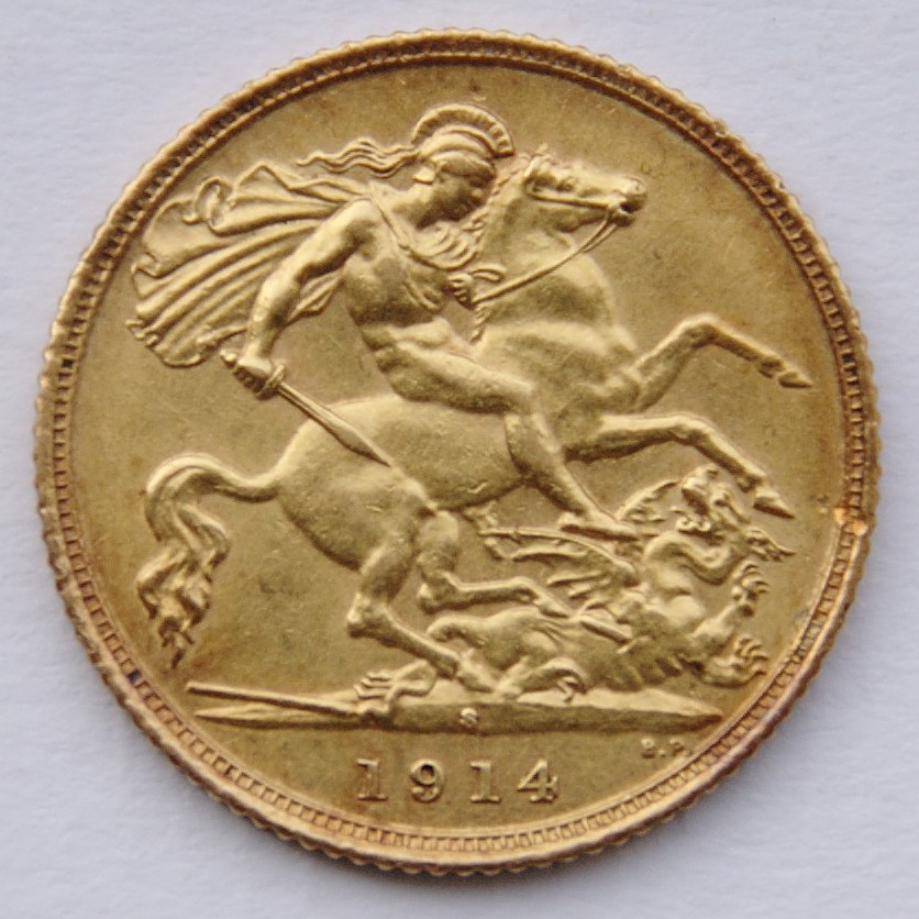 A 1914 half-sovereign minted in Sydney